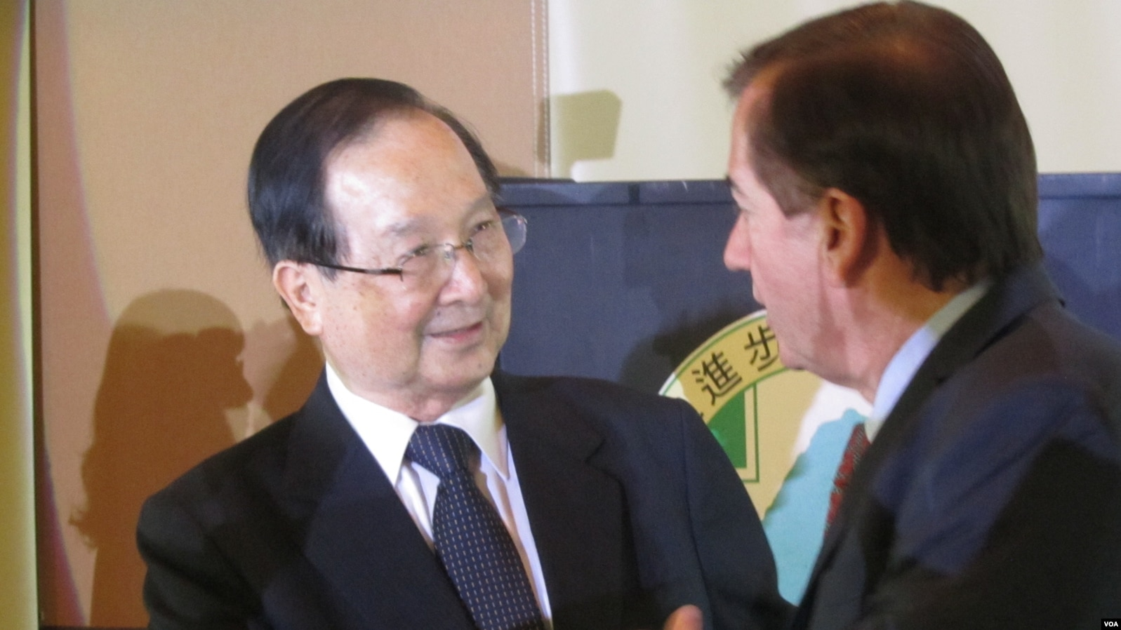 前中華民國總統府資政吳澧培